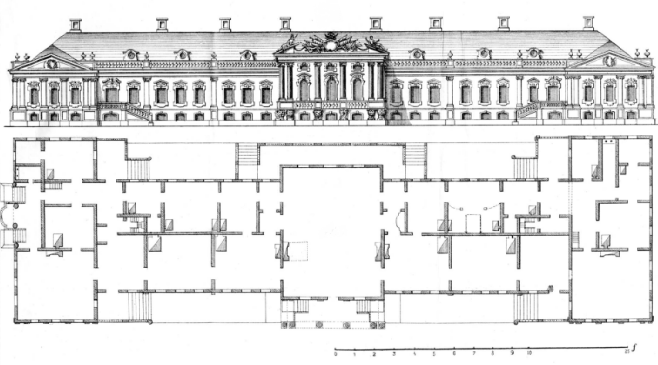 Глухів. Чоловий фасад і поземна проекція палацу Кирила Розумовського.